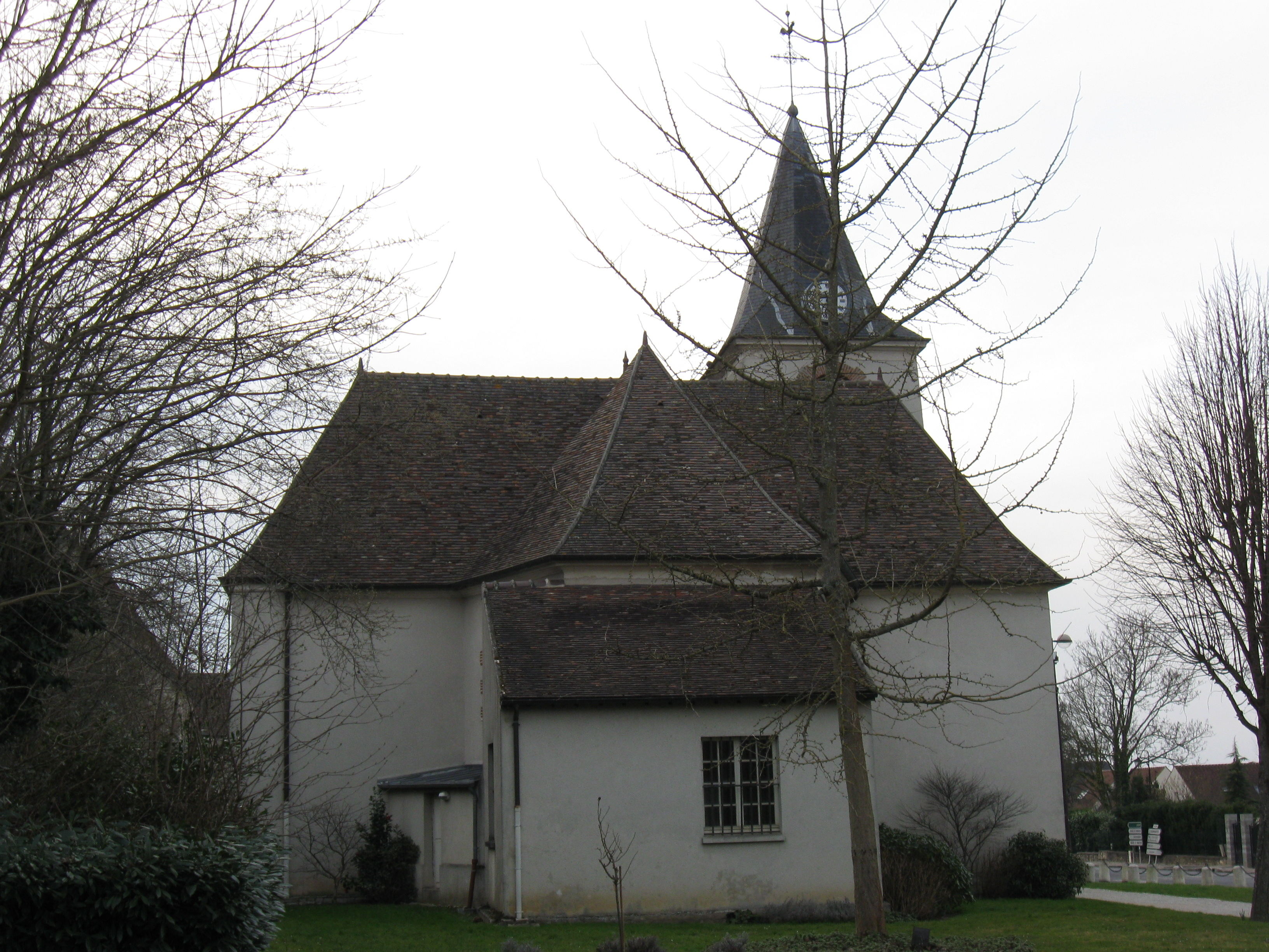 Église Saint-Christophe-et-Saint-Jacques de Guermantes. (Seine-et-Marne, région Île-de-France).